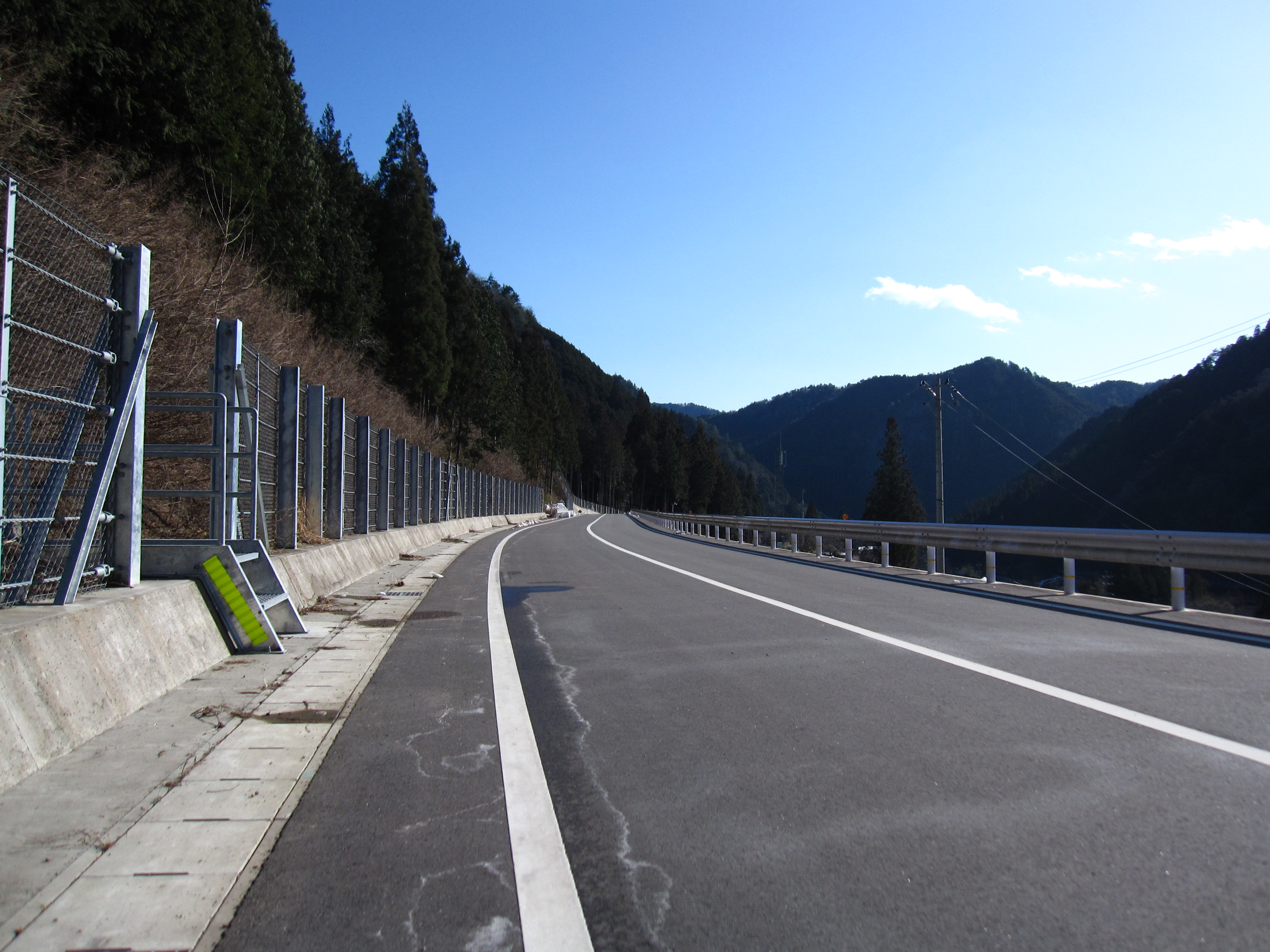 美濃東部広域農道(岐阜県加茂郡白川町地内)